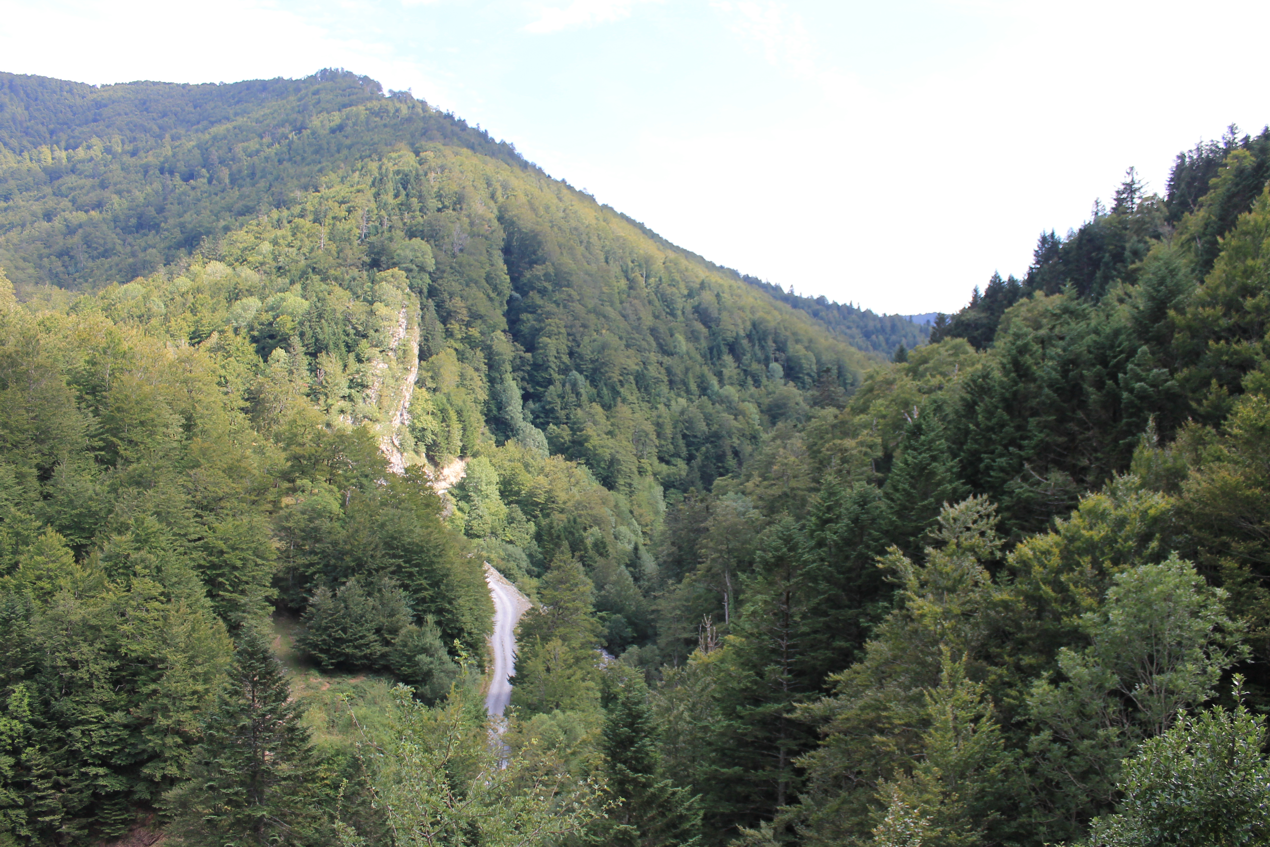 Roncesvalles-Selva de Irati This is a photography of a Site of Community Importance in Spain with the ID: ES0000126. Natura2000 entry, EEA entry